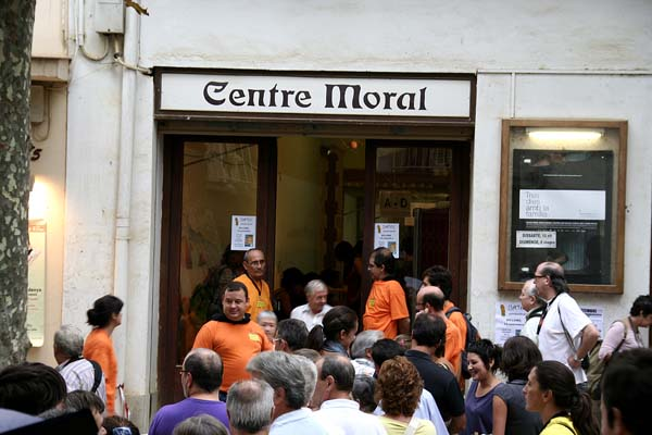 Centre Moral d'Arenys de Munt durant el 13-S.